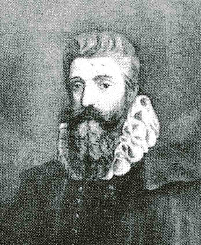 Portrait (extrait) du chanoine Vautrin Lud (créateur du Gymnase Vosgien) par Gaston Save